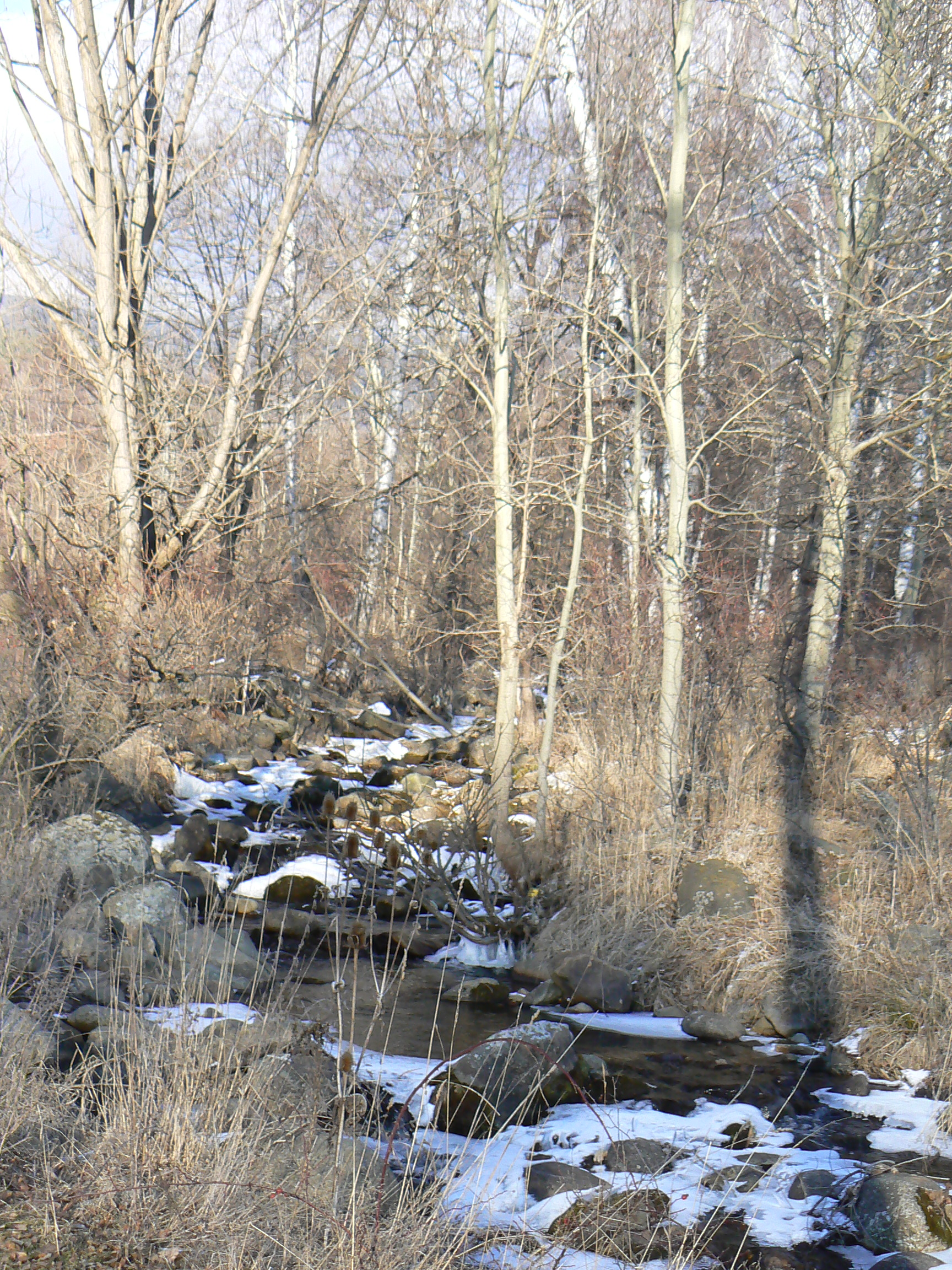 Река Струма в с. Чуйпетлово, България. River Struma in village Chuipetlovo, Bulgaria